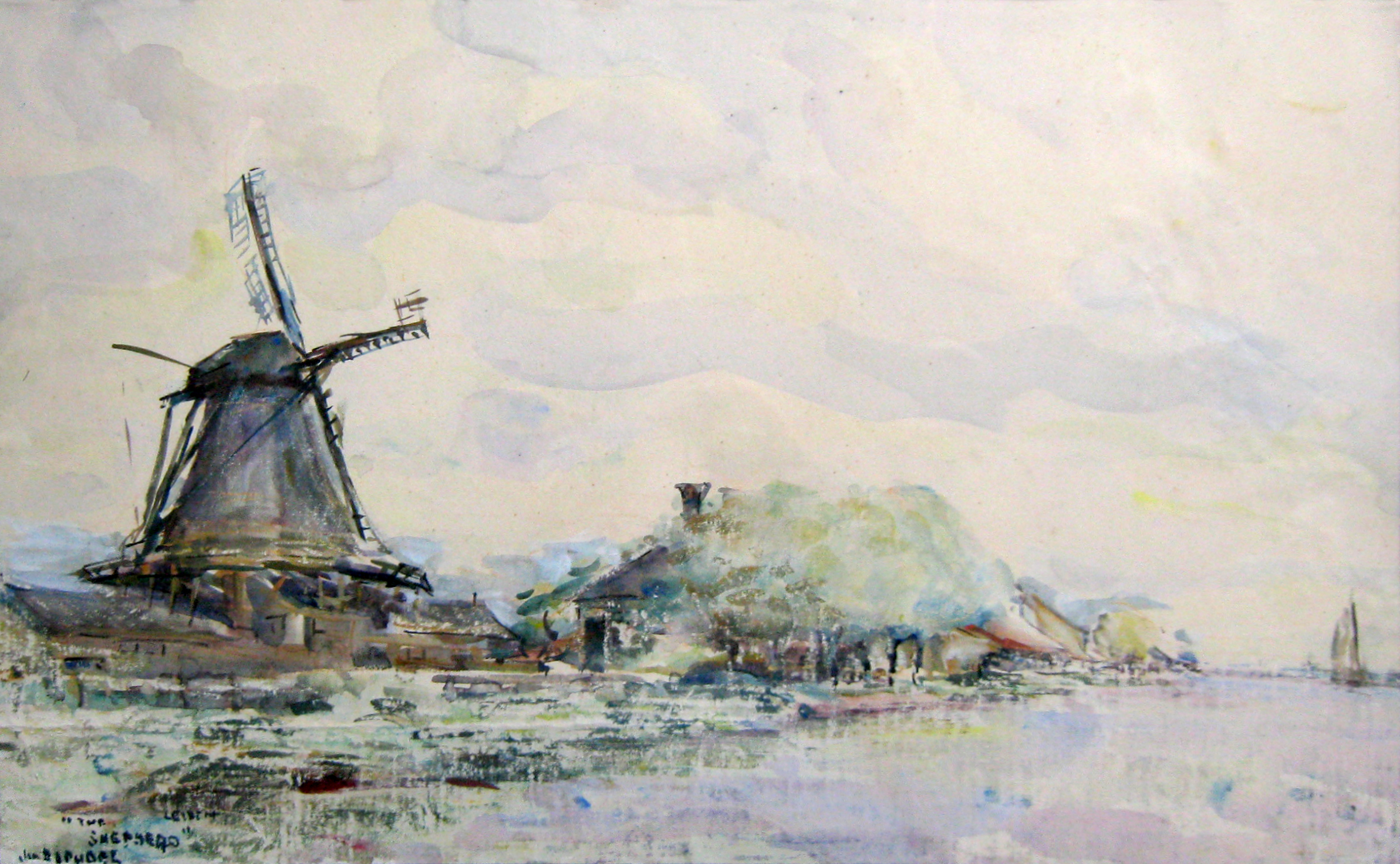 Waterverf van Joseph Raphaël, "The Shepherd", 1934